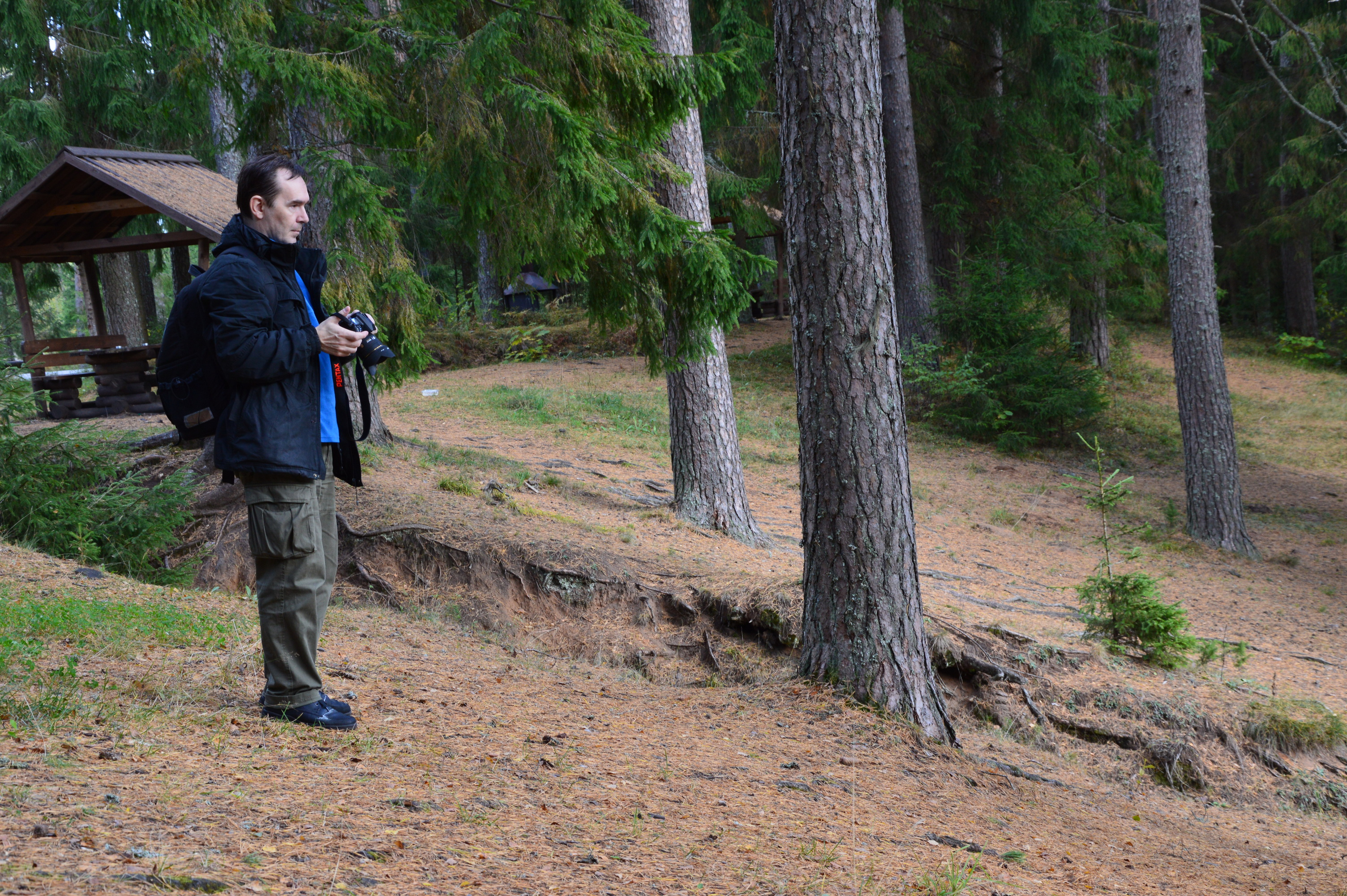 Vikipedist Ida-Virumaal.